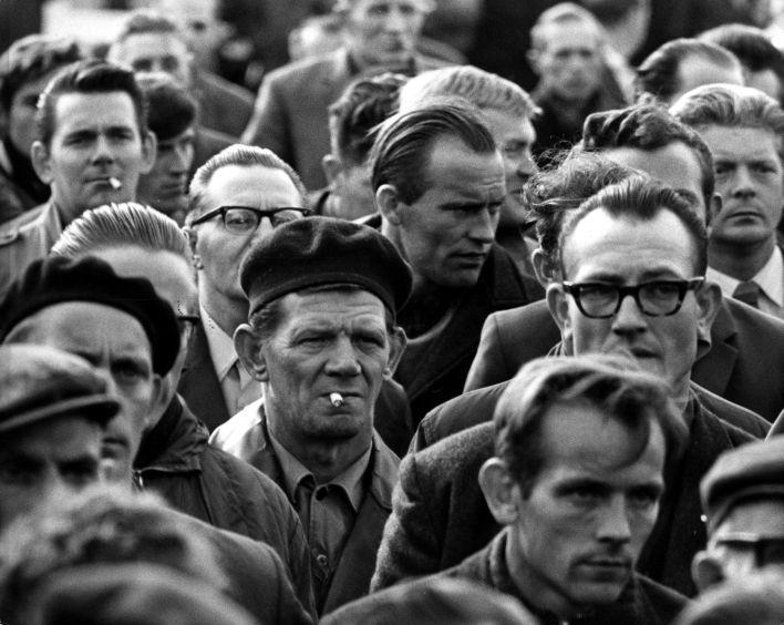 Spaarnestad Photo, SFA001002603 Stakende arbeiders. Nederland, Oude Pekela, 29 september 1969. Collectie SPAARNESTAD PHOTO/NA/Anefo Striking workers. The Netherlands, Oude Pekela, September 1969. Voor meer informatie en voor meer foto’s uit de collectie van Spaarnestad Photo, bezoek onze Beeldbank: U kunt ons helpen onze kennis van de fotocollecties te verrijken door tags en commentaren toe te voegen. Herkent u mensen of locaties of heeft u een bijzonder verhaal te vertellen bij één van de foto’s, laat dan een reactie achter (als u ingelogd bent bij Flickr) of stuur een mailtje naar: You can help us gain more knowledge on the content of our collection by simply adding a comment with information. If you do not wish to log in, you can write an e-mail to: .